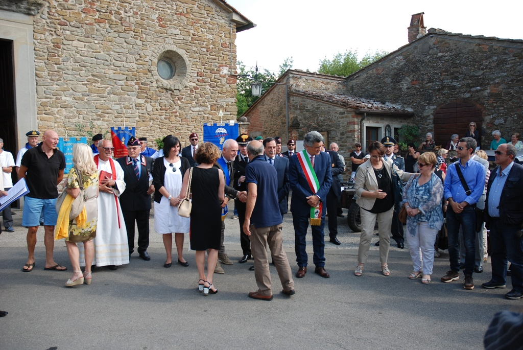 cerimonia in ricordo dei partigiani Gianni Mineo e Giuseppe Rosadi, il 28 giugno 2014, alla Chiassa Superiore (AR)